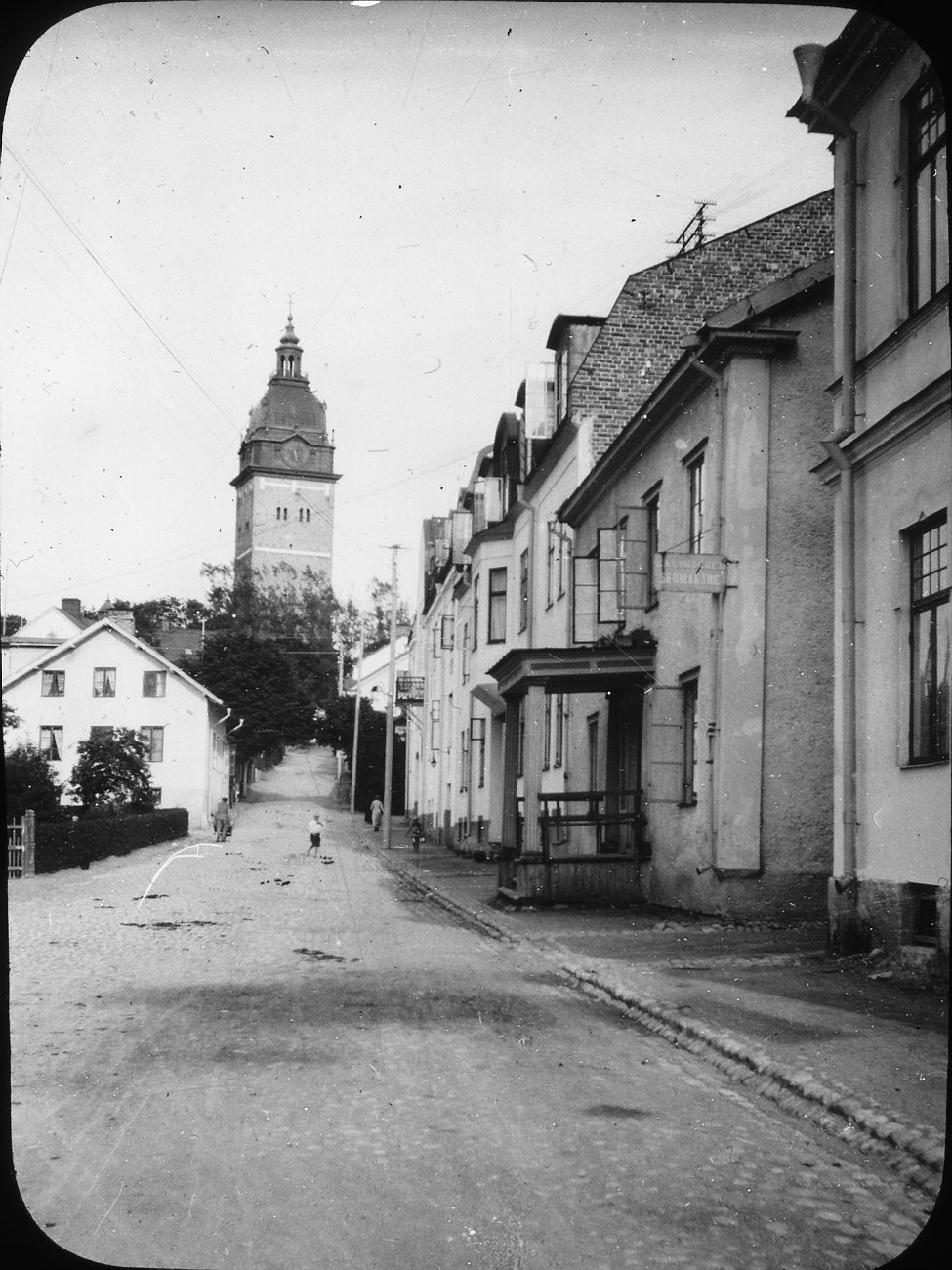 Strängnäs, 1901. I bakgrunden syns tornet på Domkyrkan.